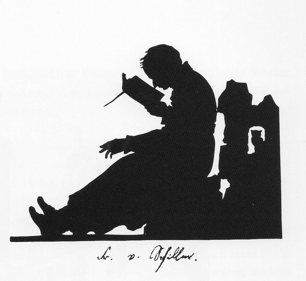 Schiller lesend